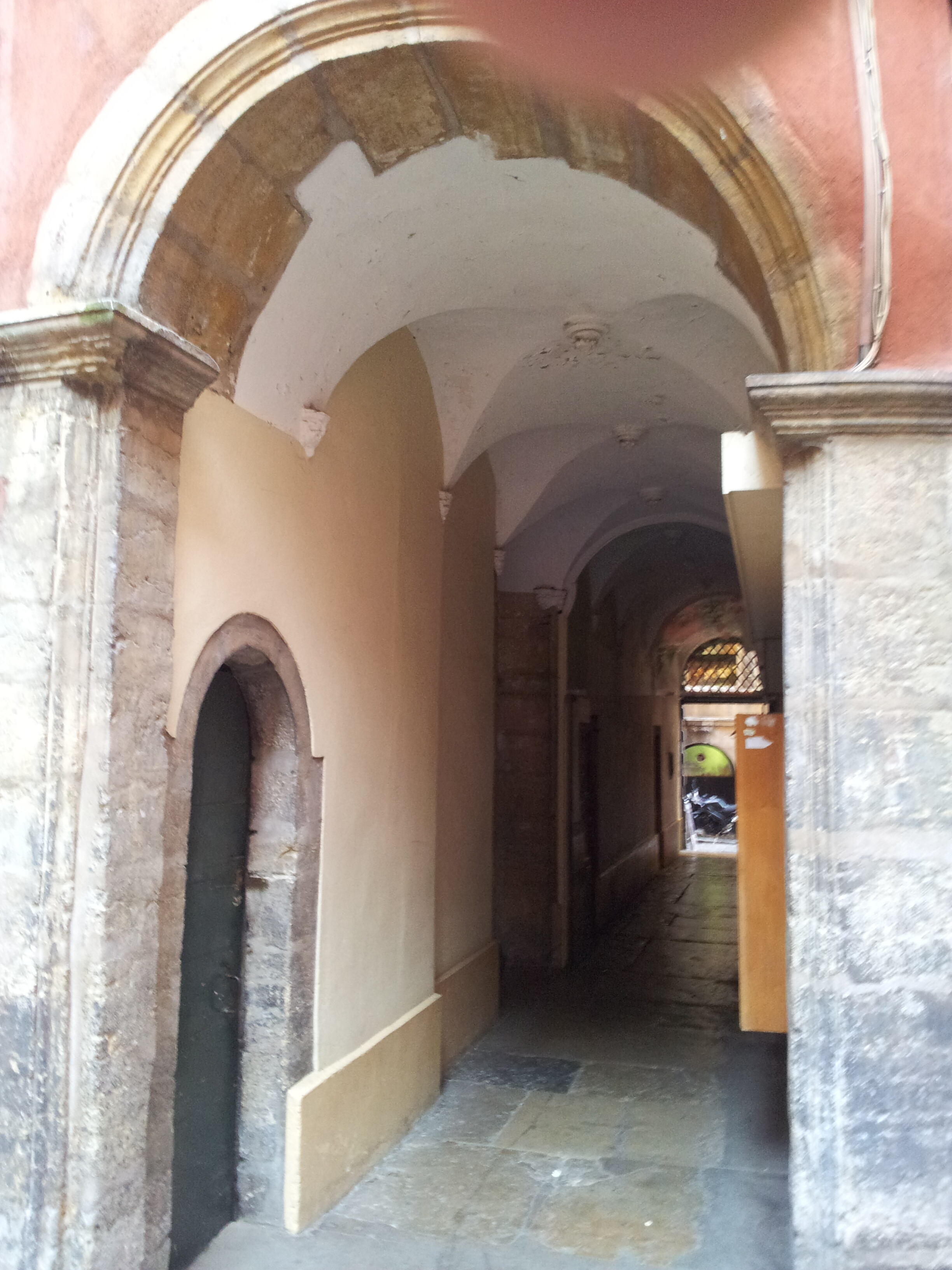 Une traboule de Lyon en 2012